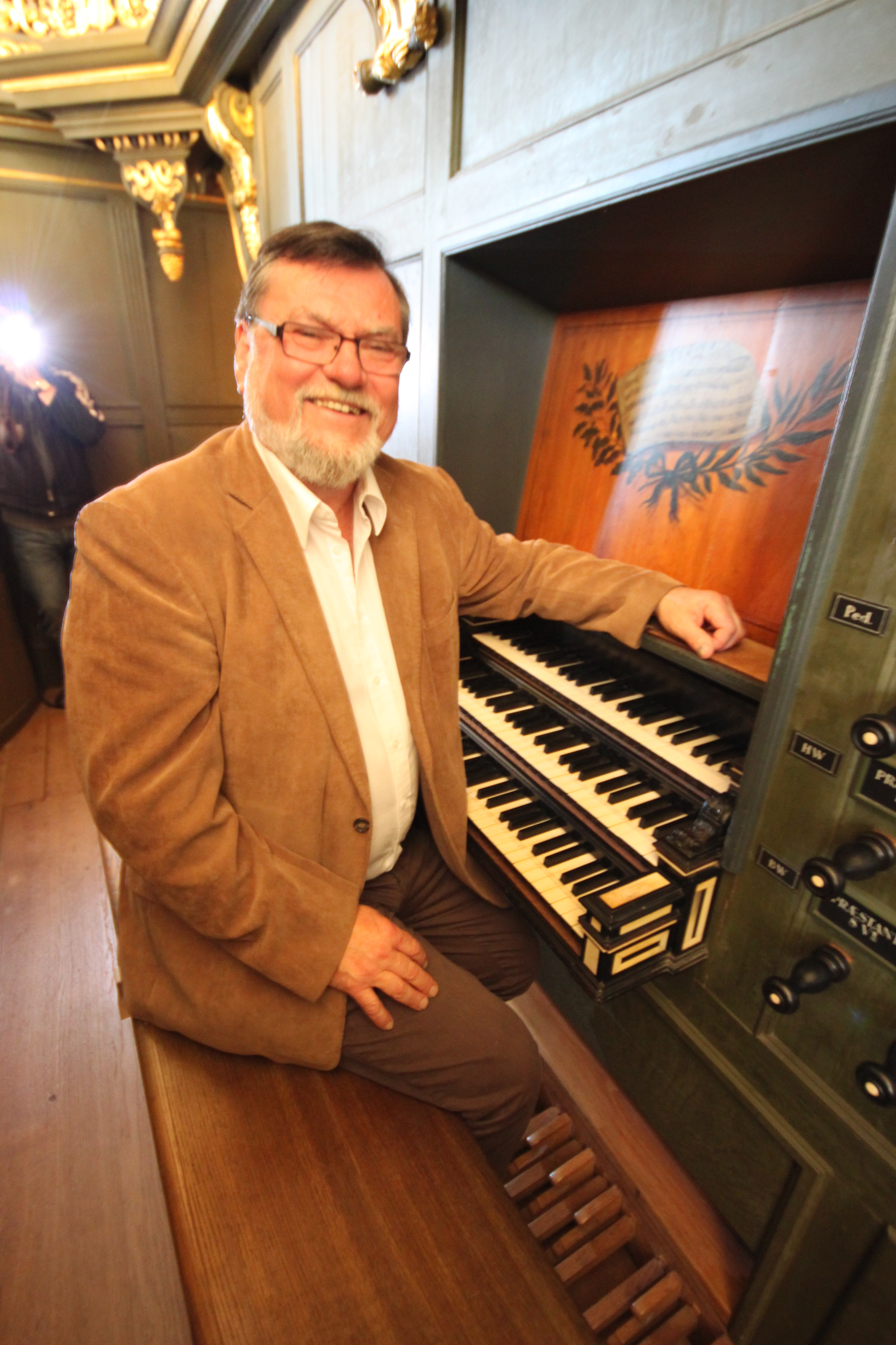 Martinikerk, Groningen, NL